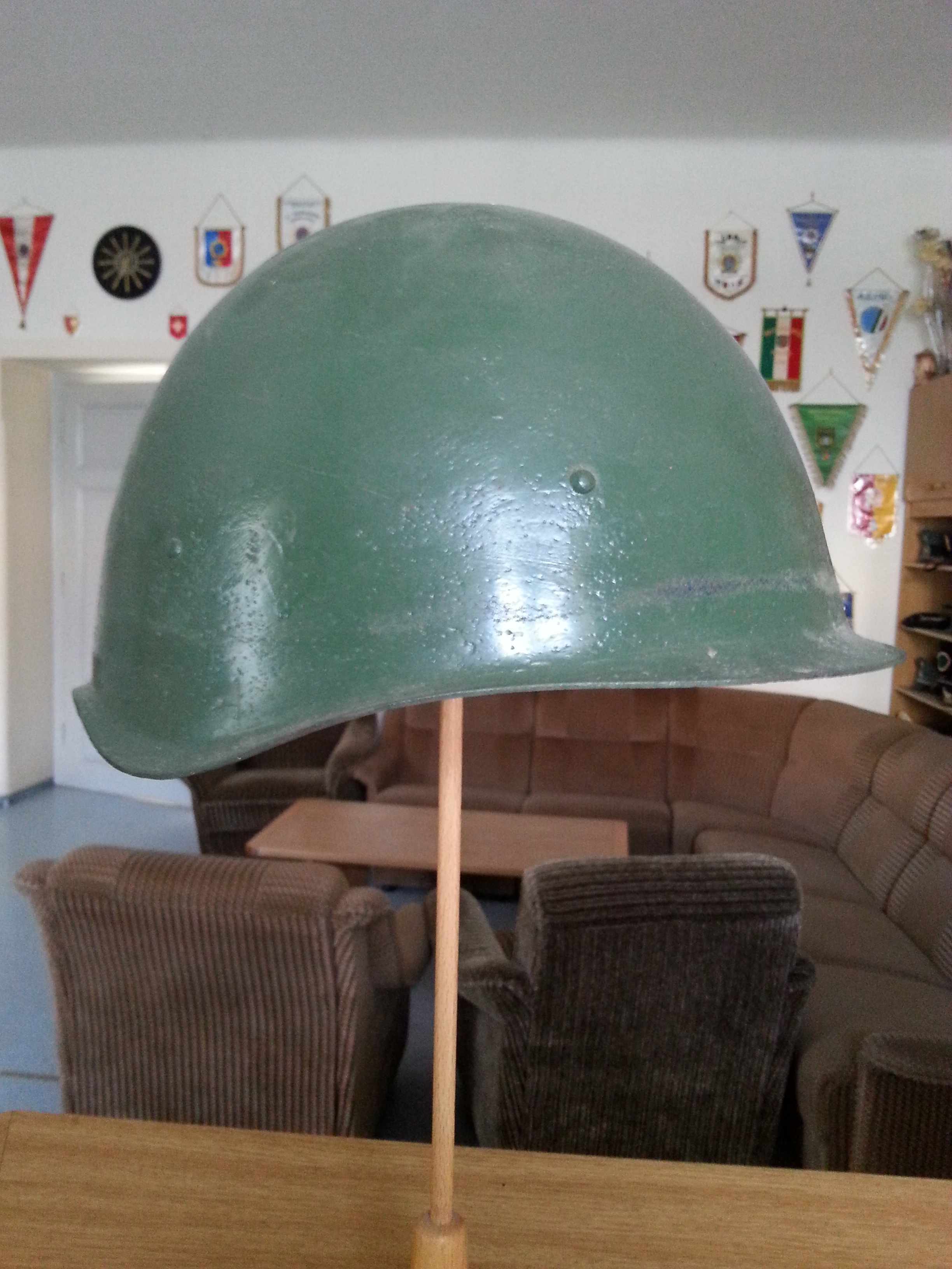 SSh-40